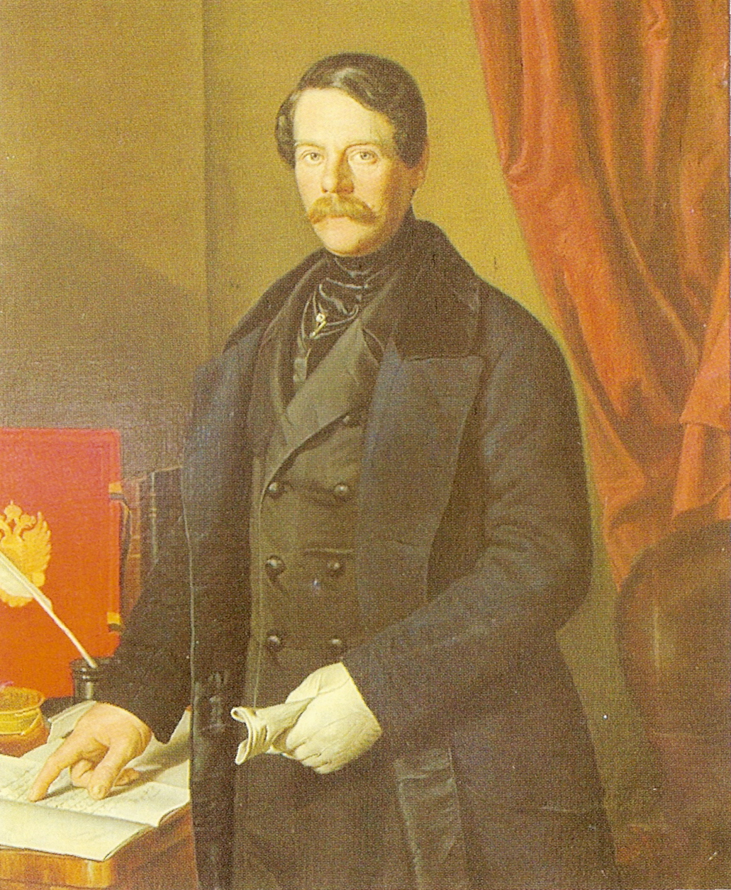 Reinhold Körner - Bürgermeister von Linz 1848-1854 und 1861-1867.